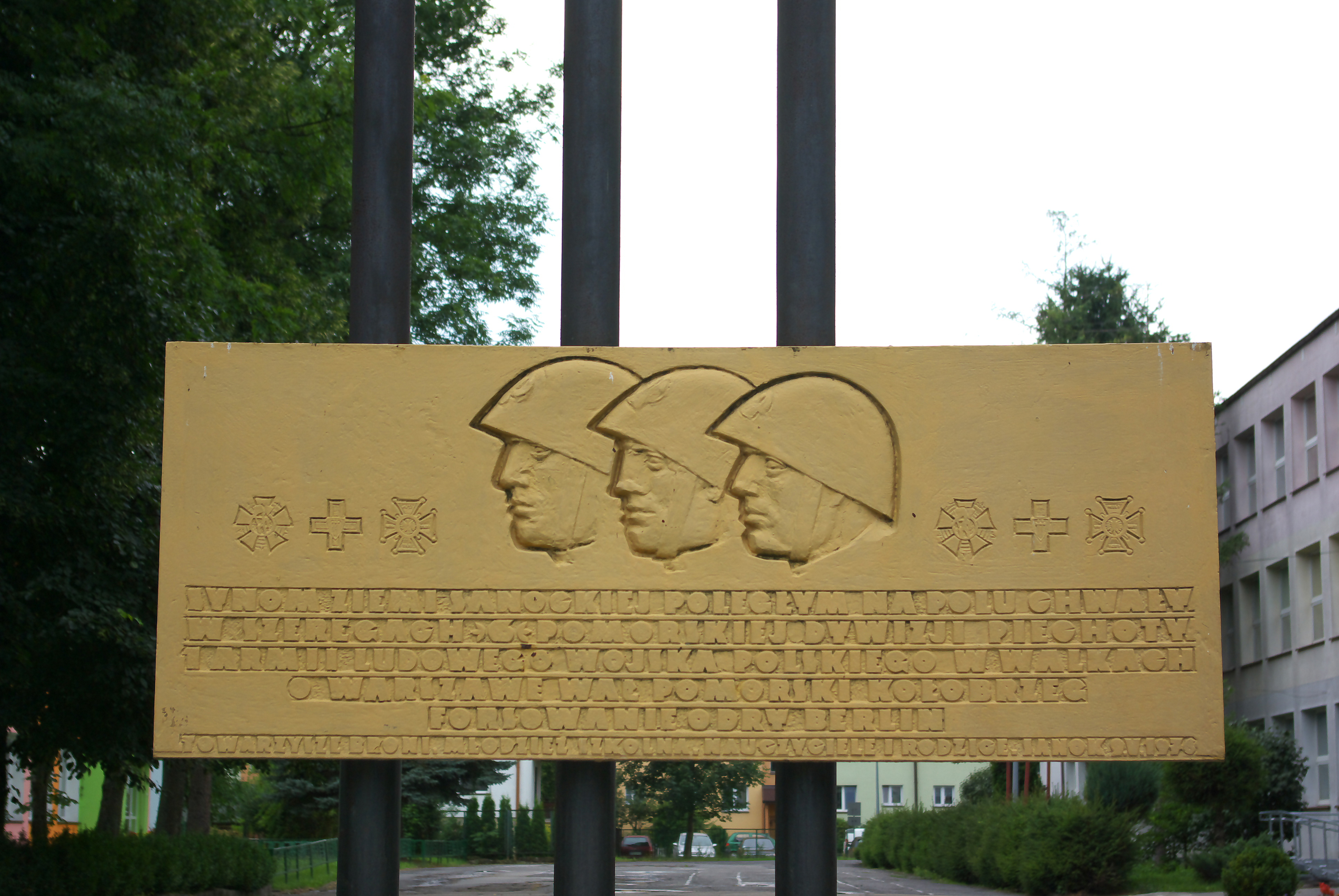 Pomnik upamiętniający żołnierzy 6 Pomorskiej Dywizji Piechoty 1 Armii Ludowego Wojska Polskiego przy ulicy Jana Pawła II w Sanoku